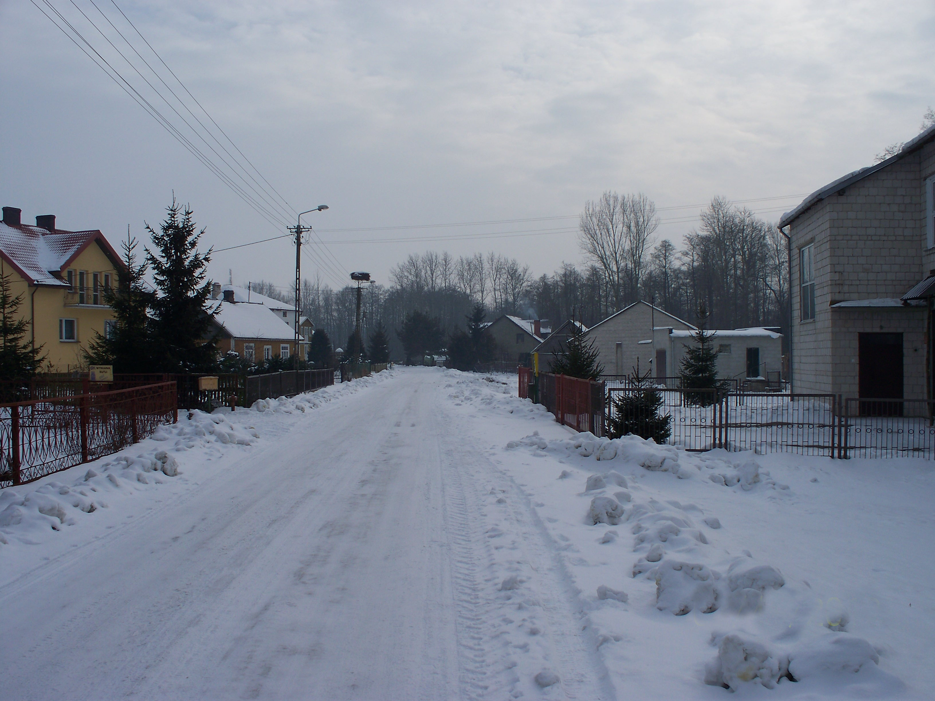 Po prawej stronie widoczna jest remiza OSP w Średnicy